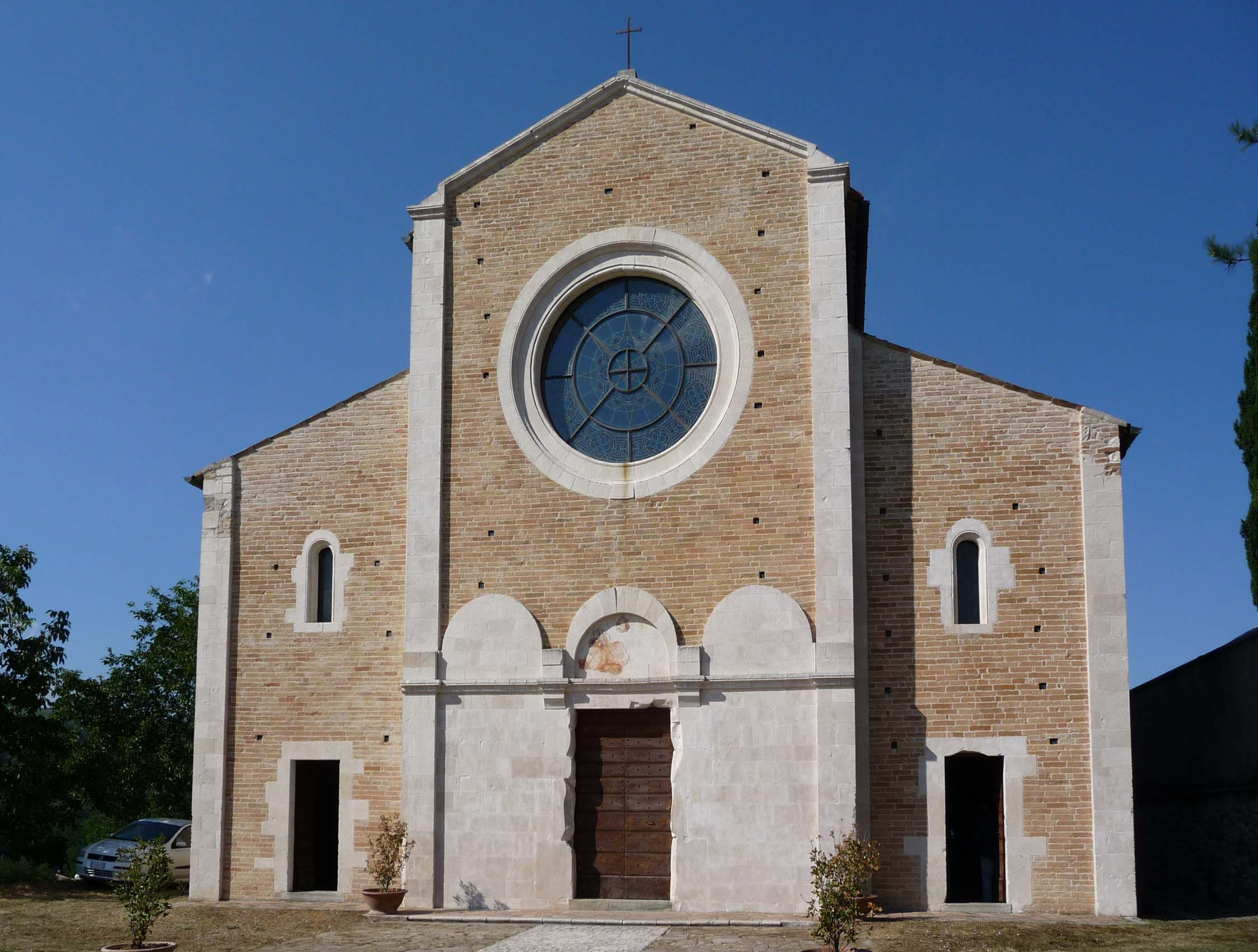 Chiesa di Santa Maria di Ronzano, facciata